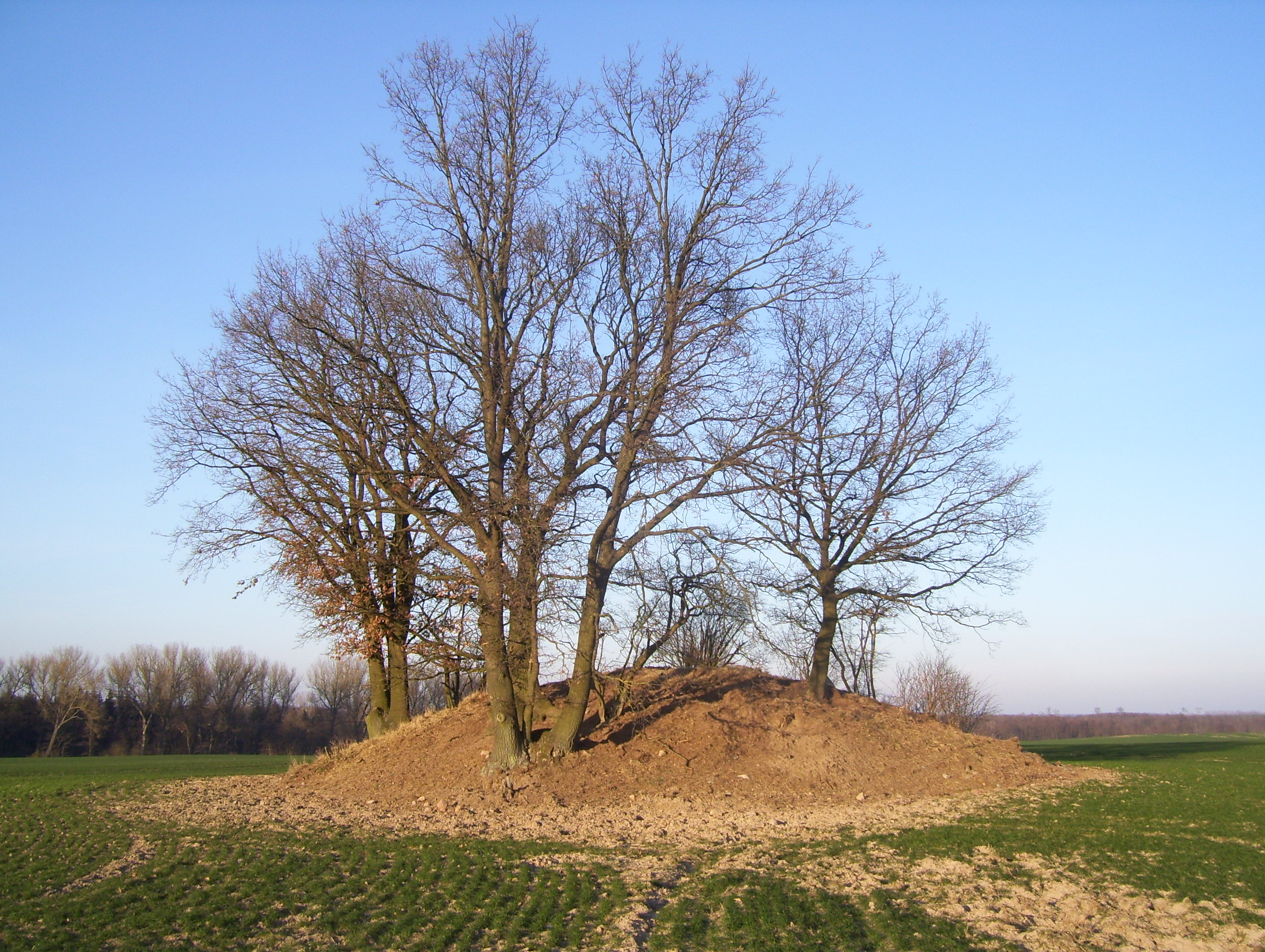 Gerichtsberg bei Kagenow, Ansicht von Süden